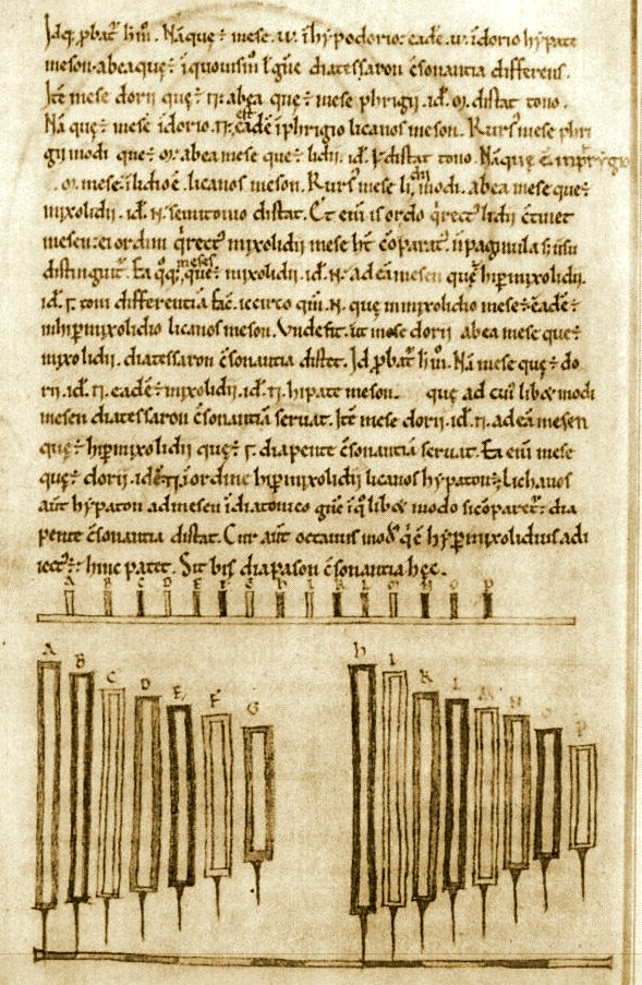 Severino Boezio, De Institutione musica, scale